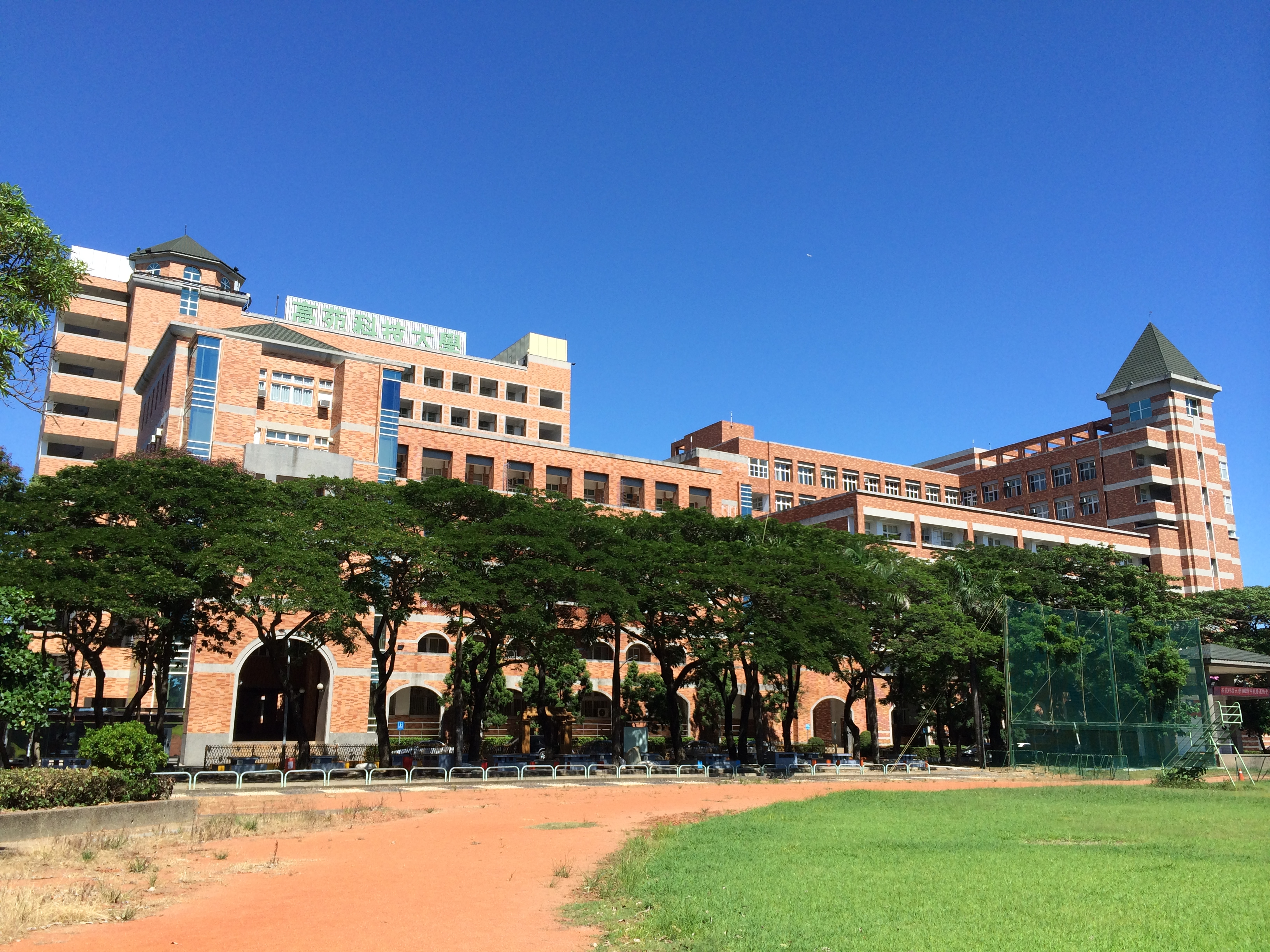 高苑科技大學校園一隅